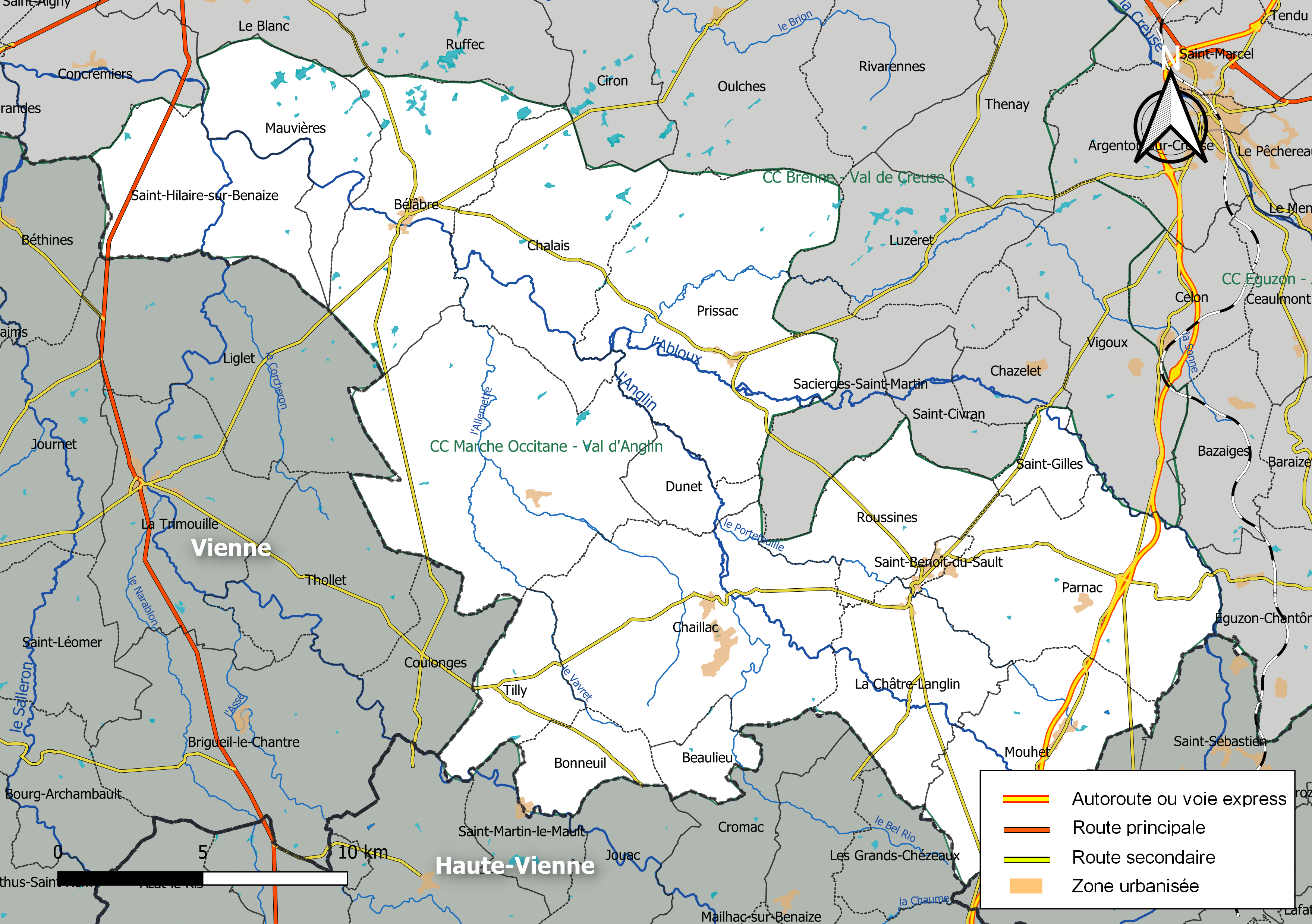 Carte de la communauté de communes Marche Occitane - Val d'Anglin, département de l'Indre, France. Composition au 1er janvier 2019.